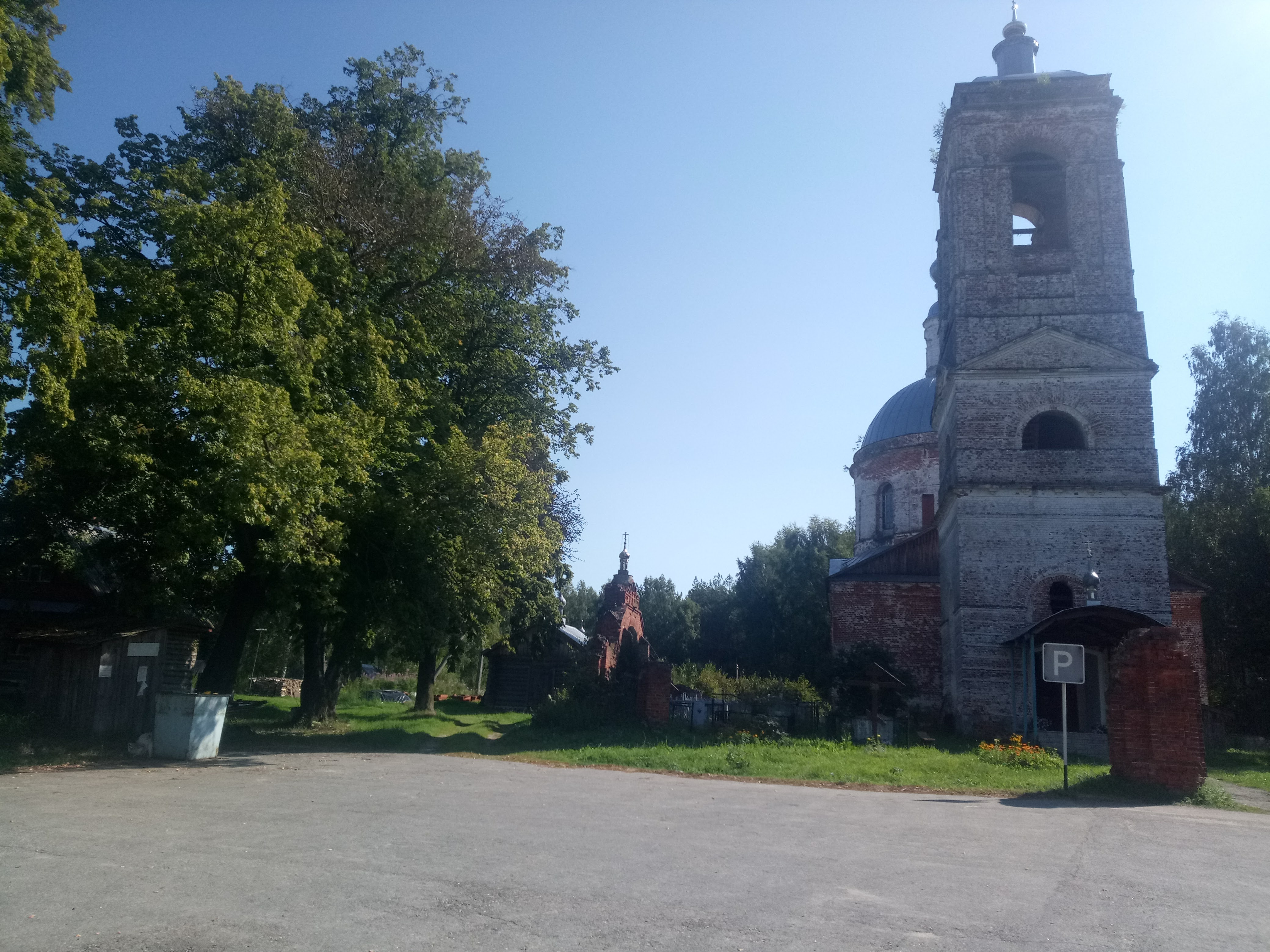 Церковь Покрова Богородицы: Глазово (погост Семинова Гора), Камешковский район, Владимирская область